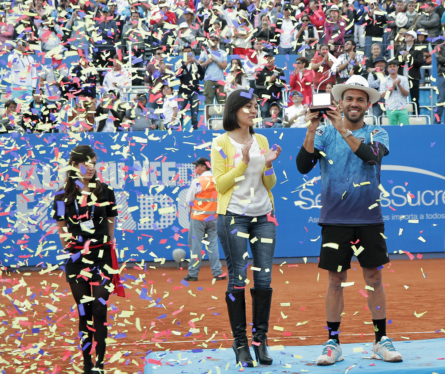 Quito, 08 feb (ANDES).- Final ATP 250 Ecuador Open Quito donde compitieron por el campeonato los tenistas Victor Estrella y Feliciano López. Fotografías: Carlos Rodríguez/ANDES.